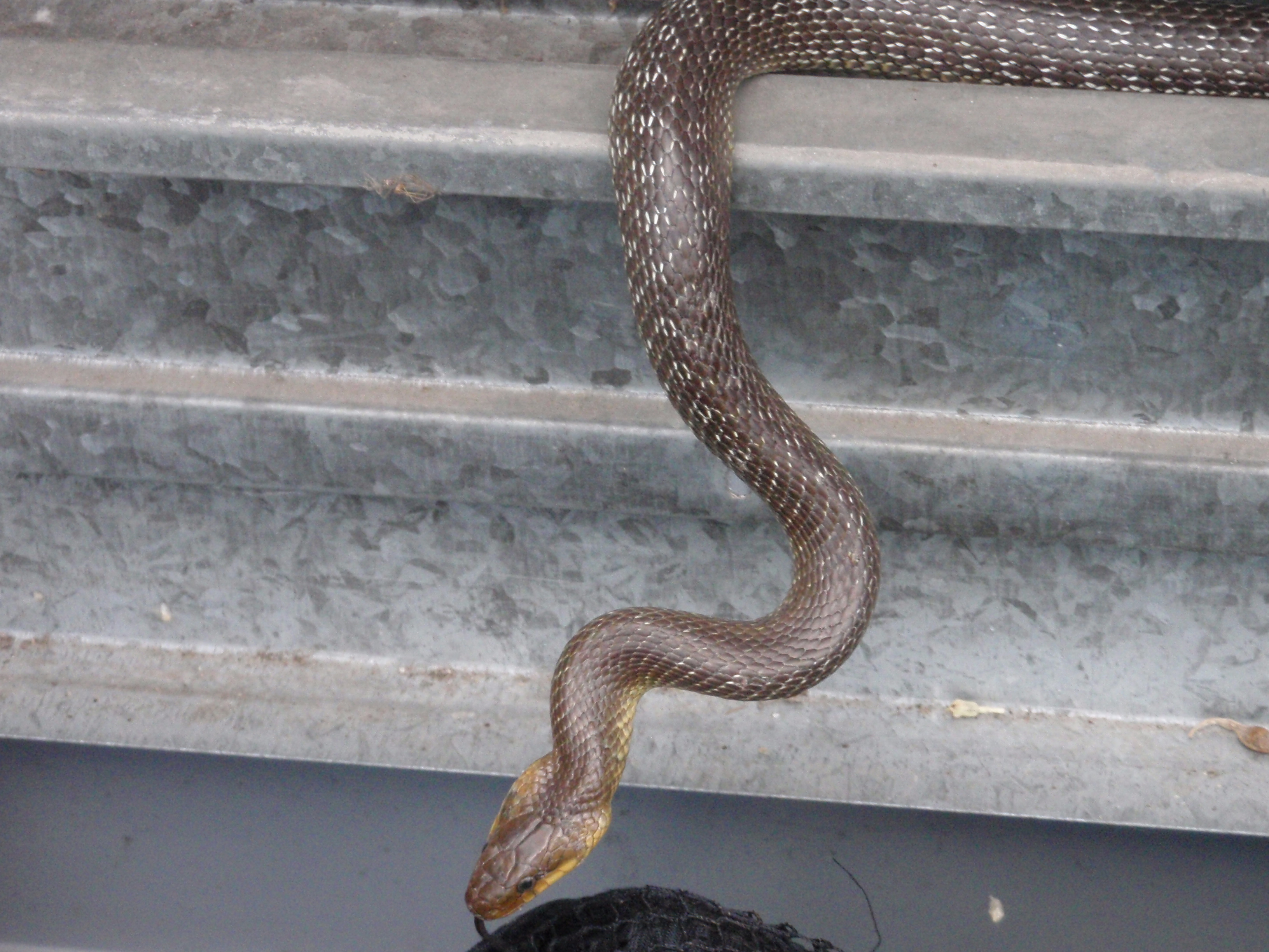 Begegnung am Fischteich